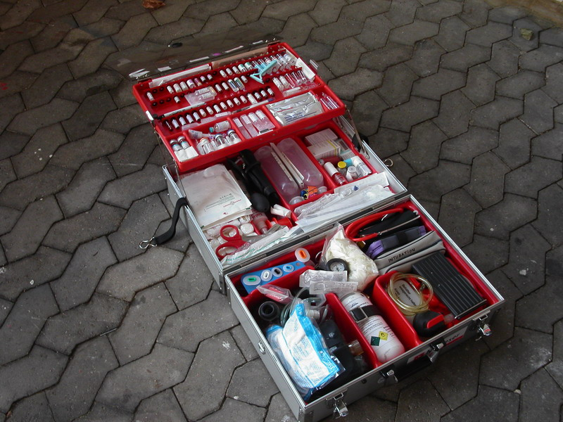 Notfallkoffer, geöffnet